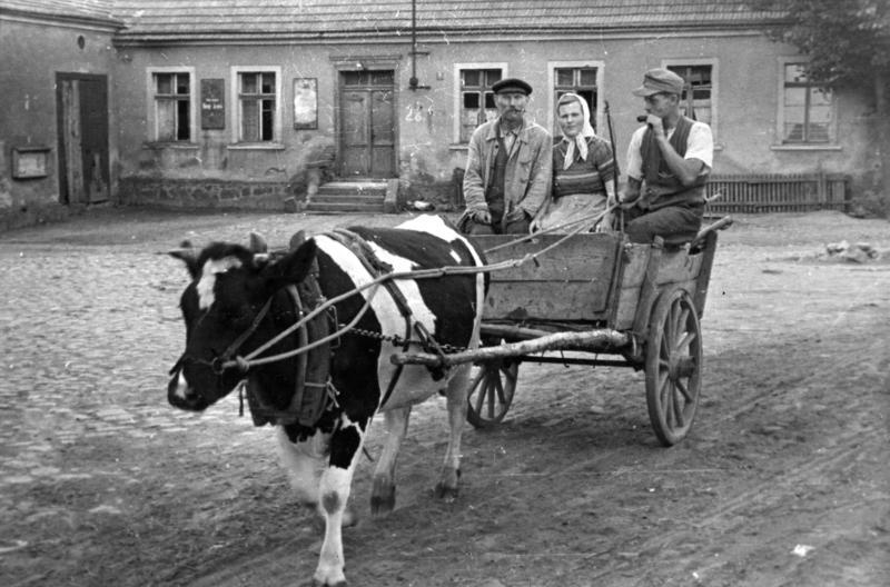 bei Randow / Mecklenburg, Bauer hat Kuh eingespannt. Illus-Diedrich 1948 Die Neusiedler des Notstandsgebietes Krs. Randow haben durch die Viehverteilung neue Rinder erhalten. Stolz fährt der Neubauer aus Hohenselchow mit seinem neuen Kuheinspänner durchs Dorf. 2077-48